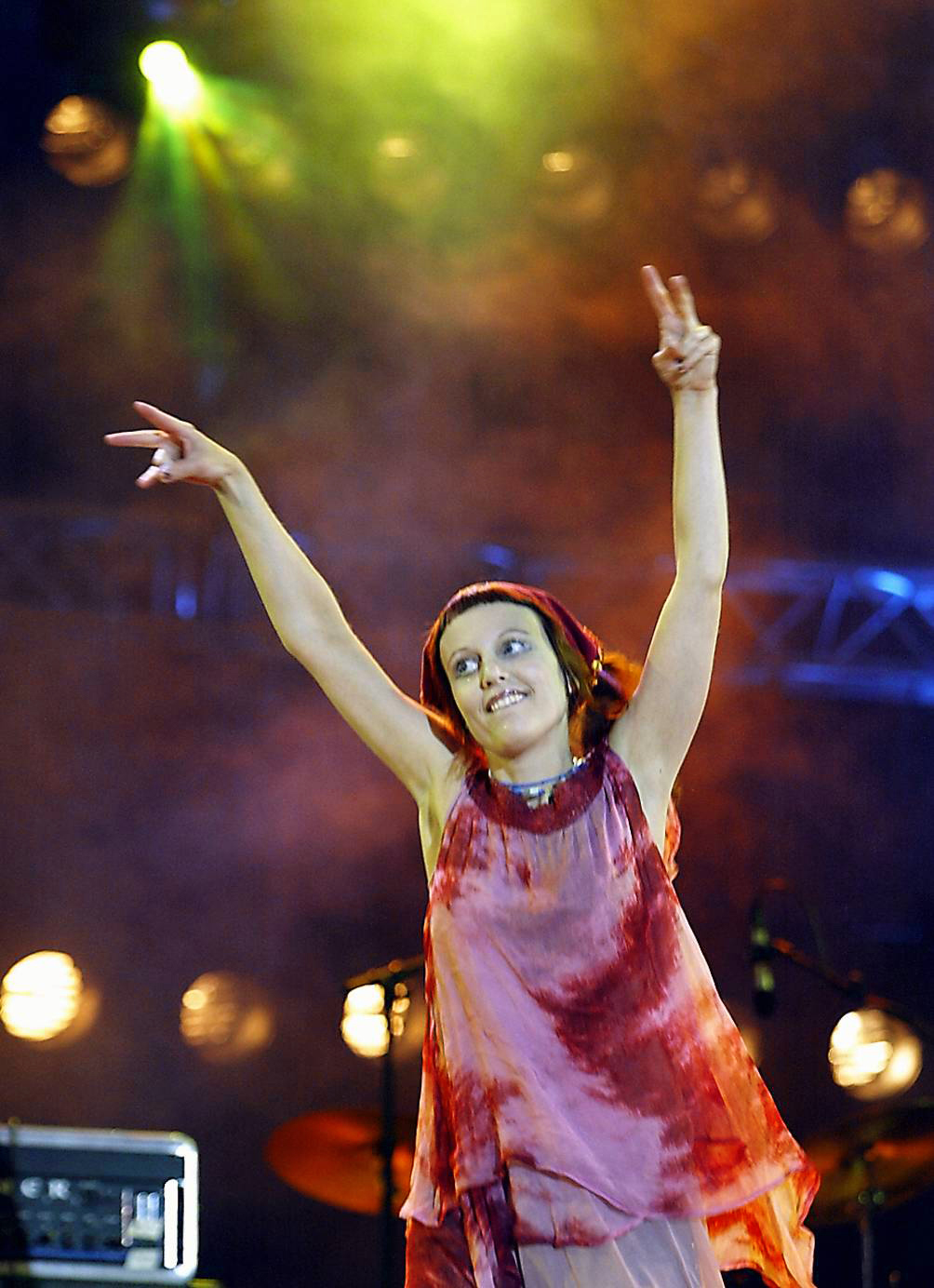 Karlshamn - Solblomma